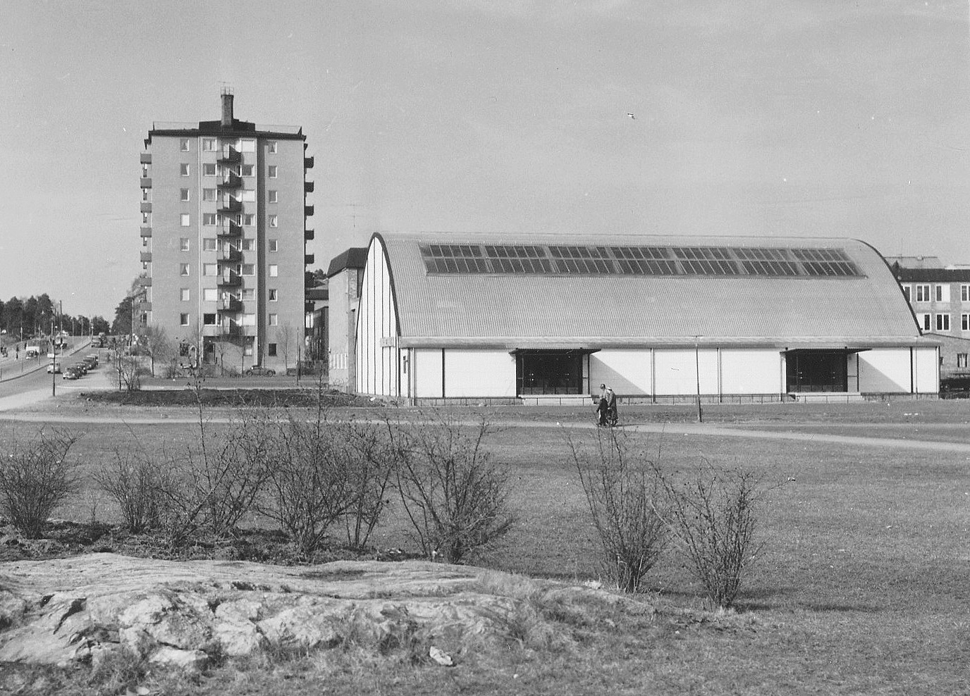 Gubbängshallen. Gubbängens gymnasium till höger och punkthuset till vänster.